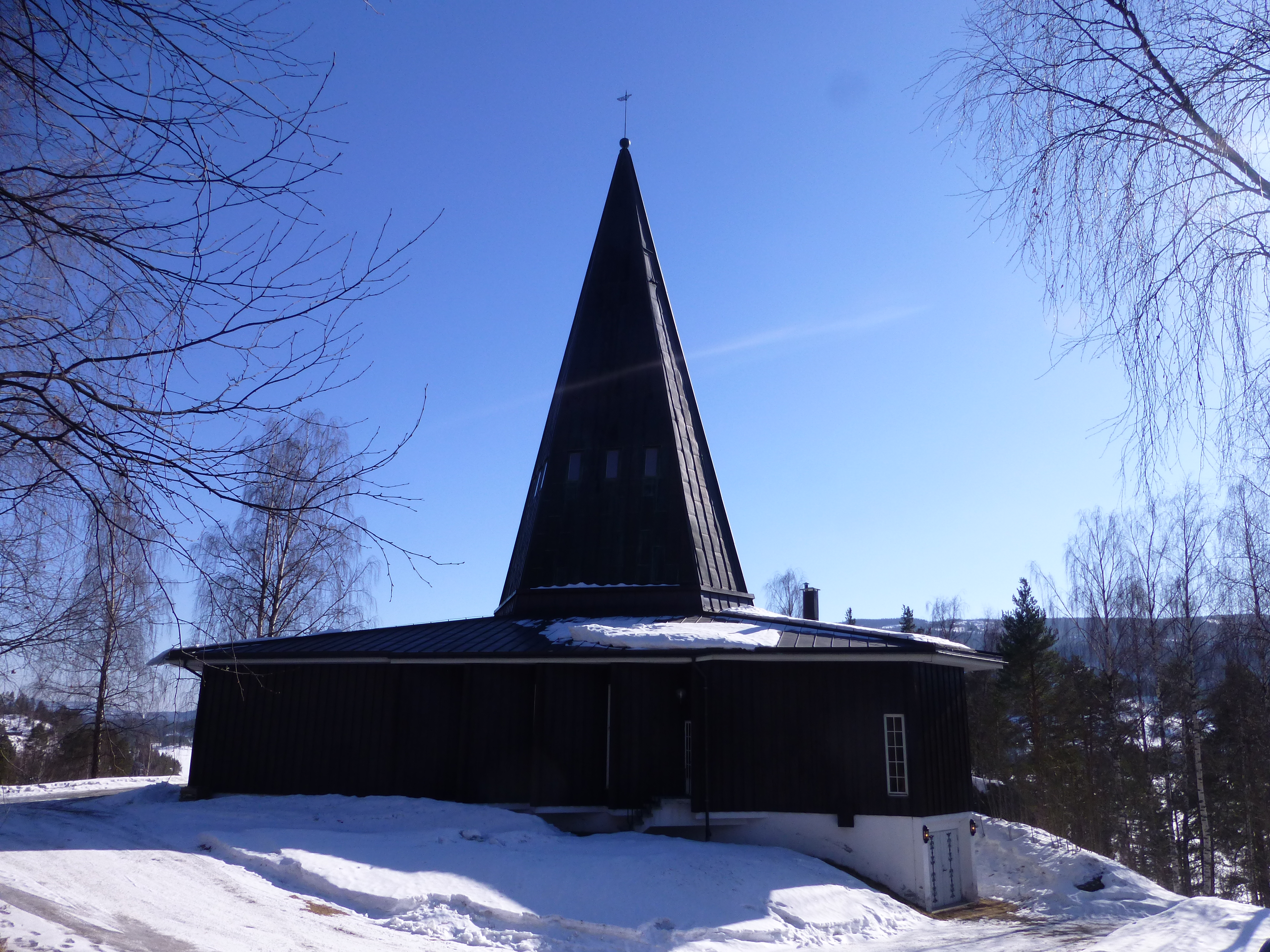 Tingnes kirke på Fagernes i Nord-Aurdal i Oppland i Norge.